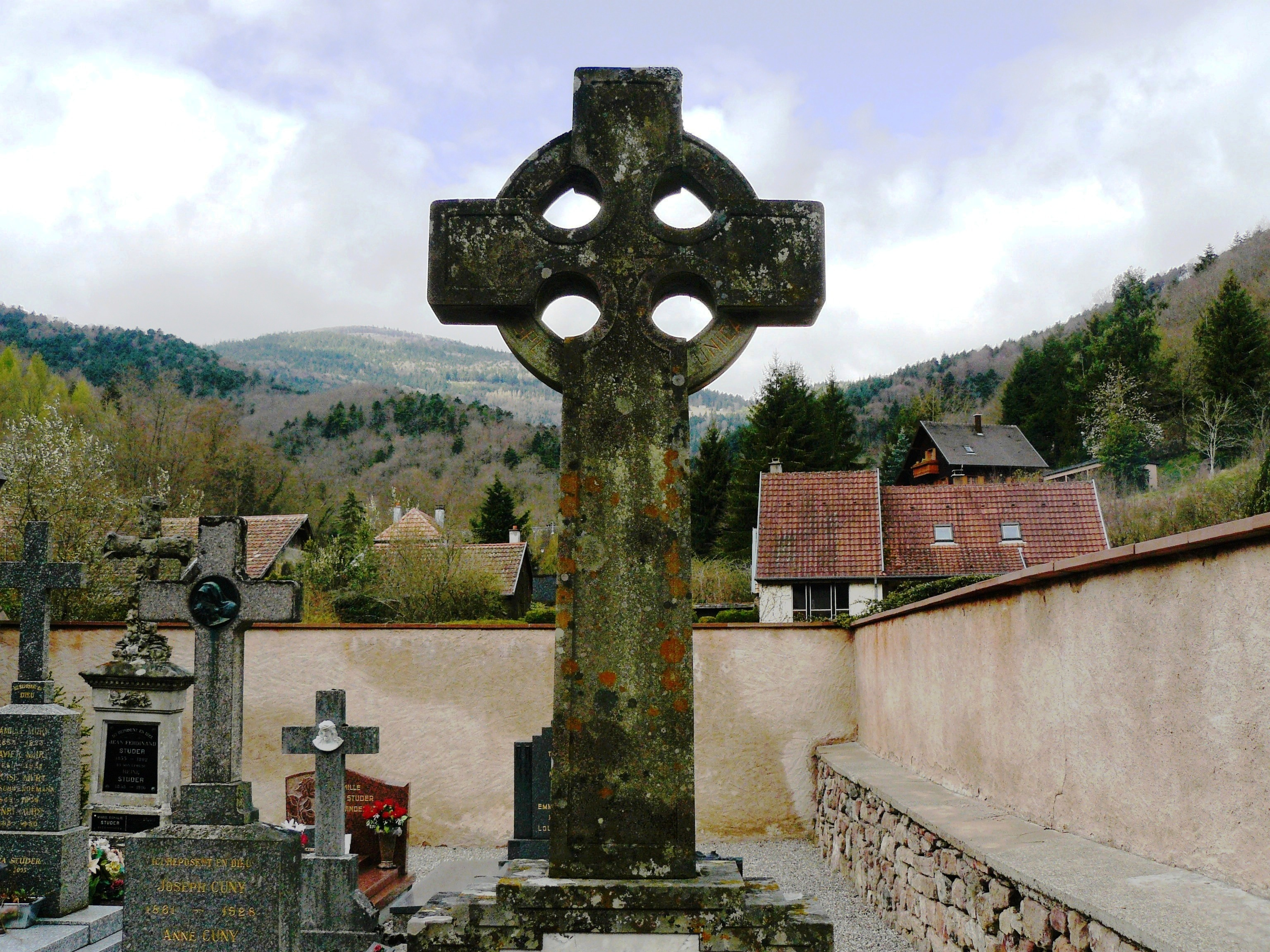 Image: Murbach 024.JPG